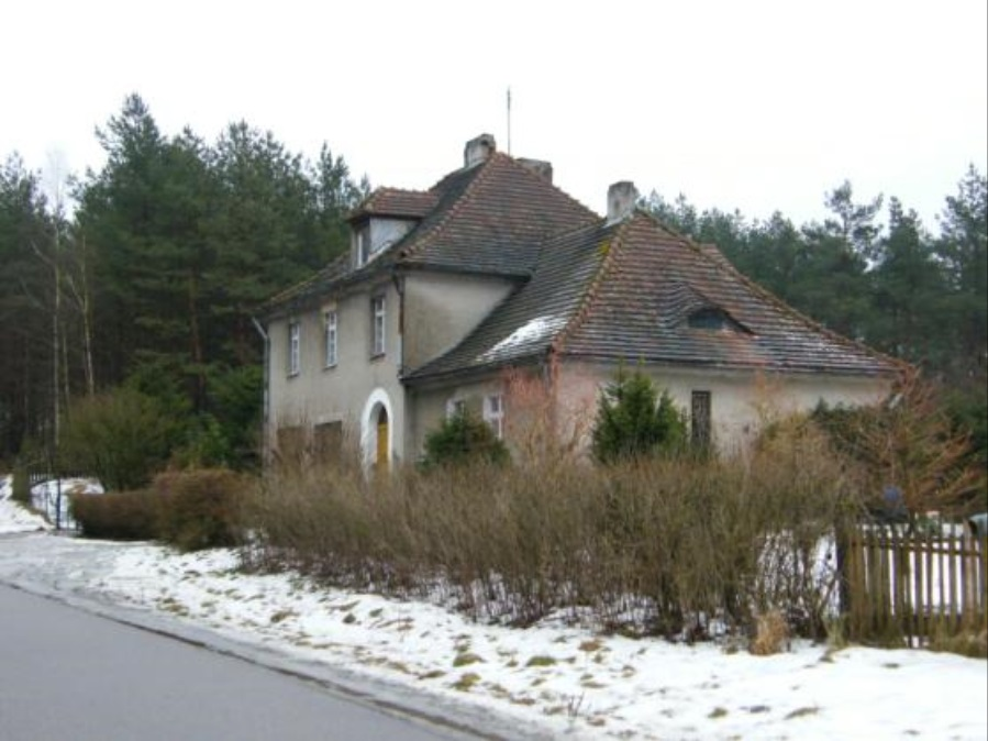 Budynek SG Brzeźno Szlacheckie